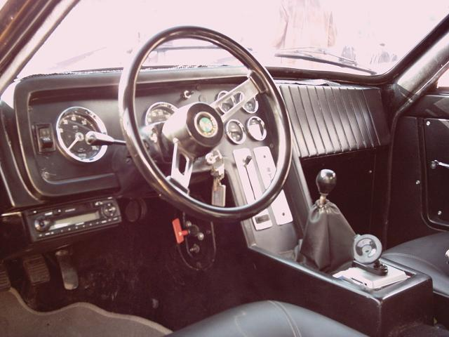 Türkiye'de seri olarak üretilen ilk otomobil markası Anadol'dan bir görünüm.